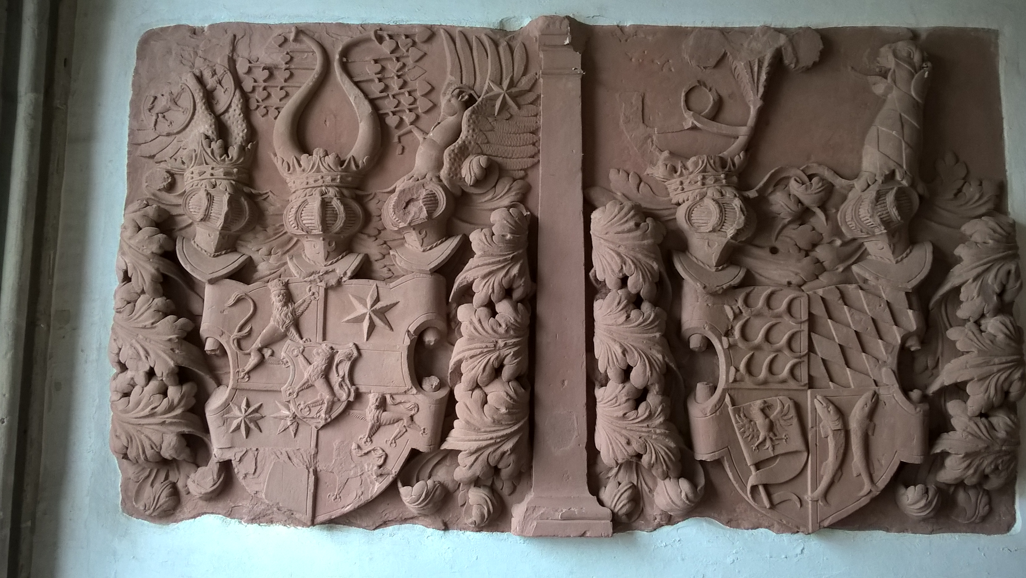 Evangelische Kirche Merlau, Gemeinde Mücke, Vogelsbergkreis, Hessen, Deutschland